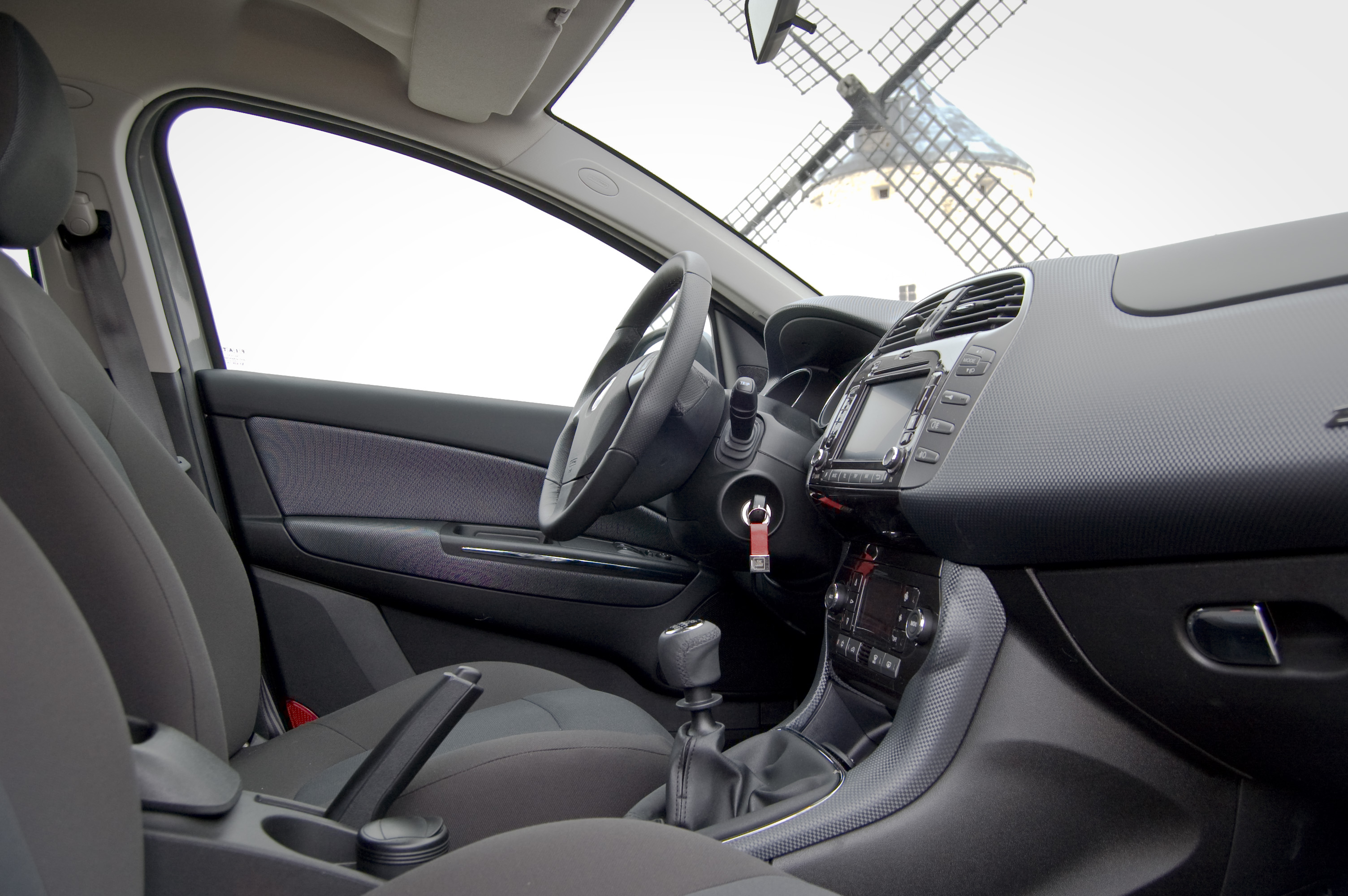 Fiat Bravo prueba y "photoshoot" en los molinos de viento de Consuegra (Toledo). Prueba en Diariomotor